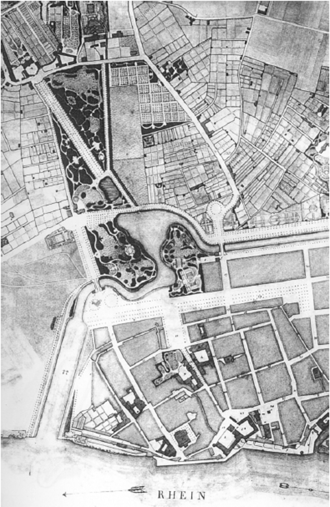 Hofbaumeister K.A. Huschberger mdl. überliefert und von Guffroi 1809 festgehalten, Rahmenplanung Düsseldorf mit seiner nächsten Umgebung nach geschleiften Festungsbauwerken